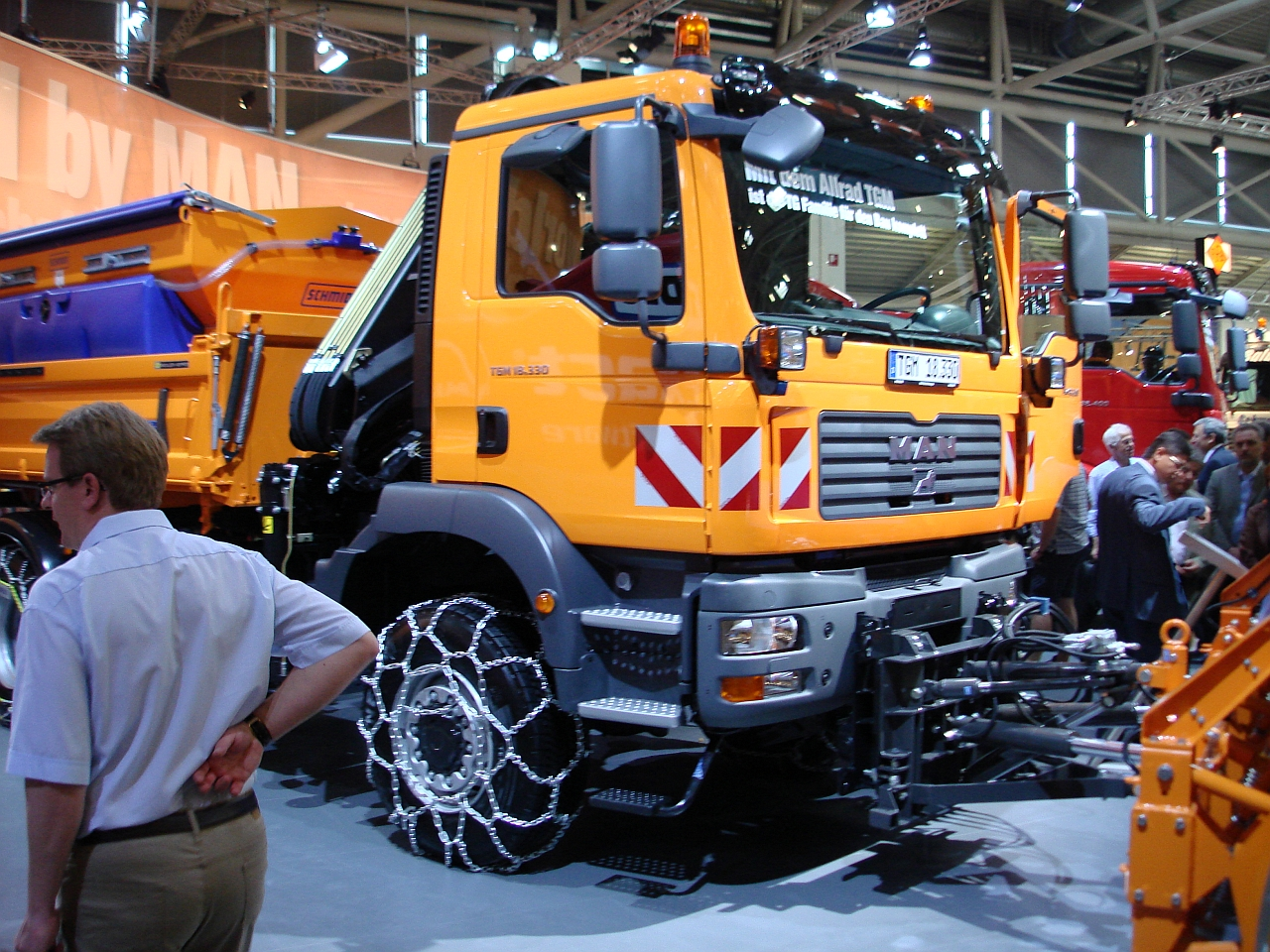 MAN TGM 18.330 auf der bauma 2007